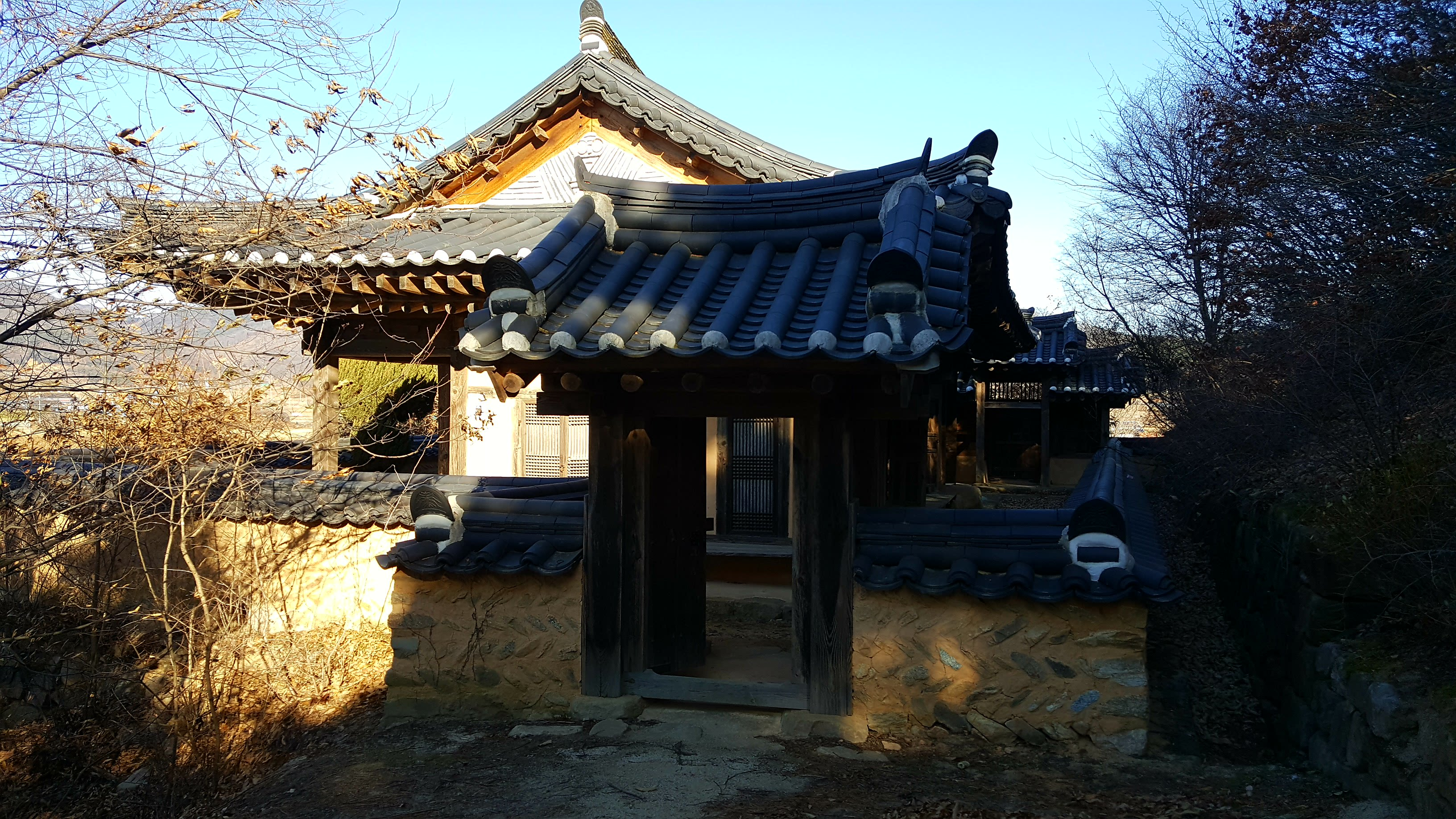 예천권씨 병암정 및 별묘